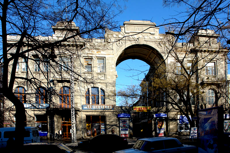 Кинотеатр им. Т.Г. Шевченко. г. Симферополь, ул. Горького, 5 Памятник архитектуры.